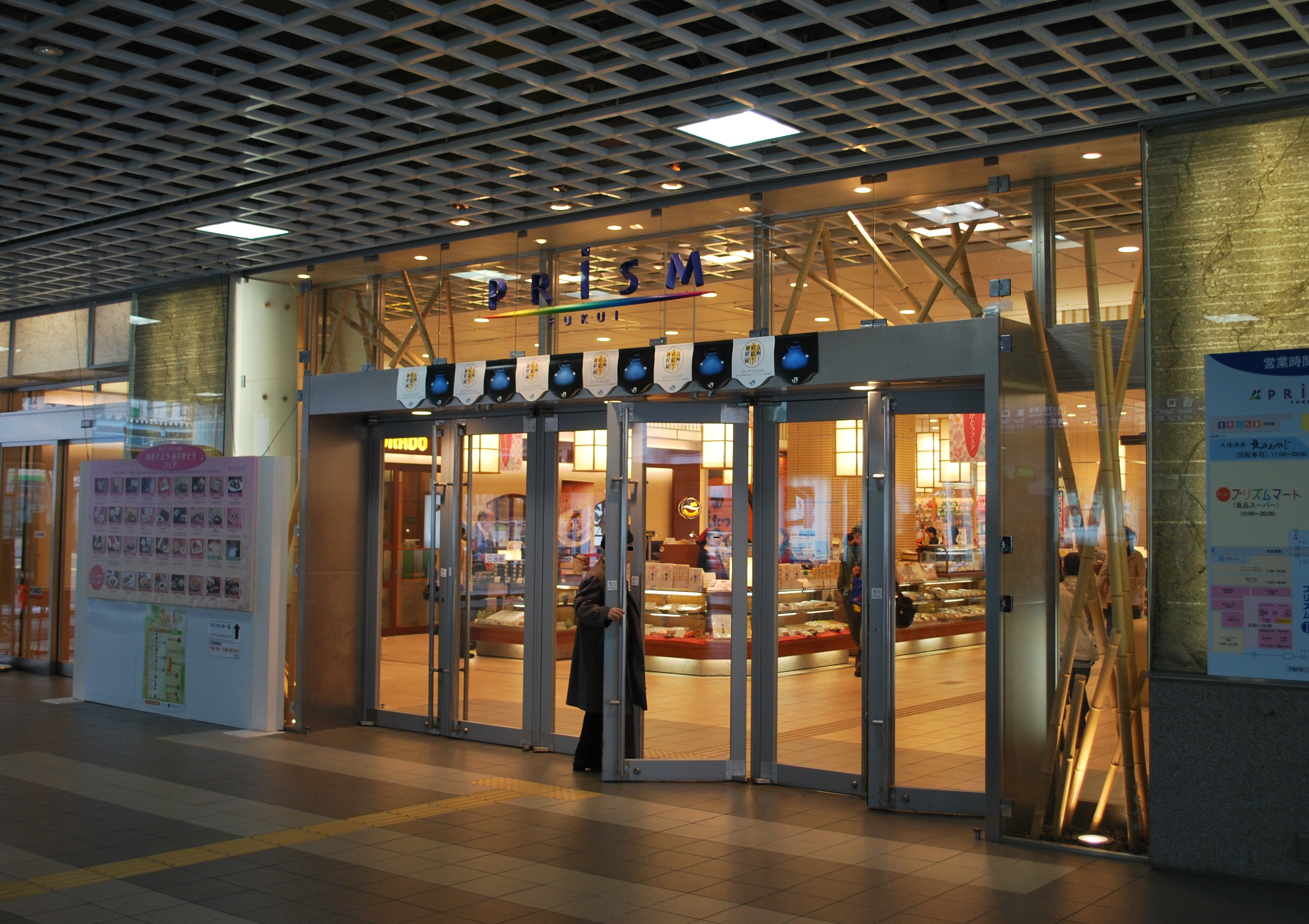 JR福井駅内の商業施設、プリズム福井。作者撮影。